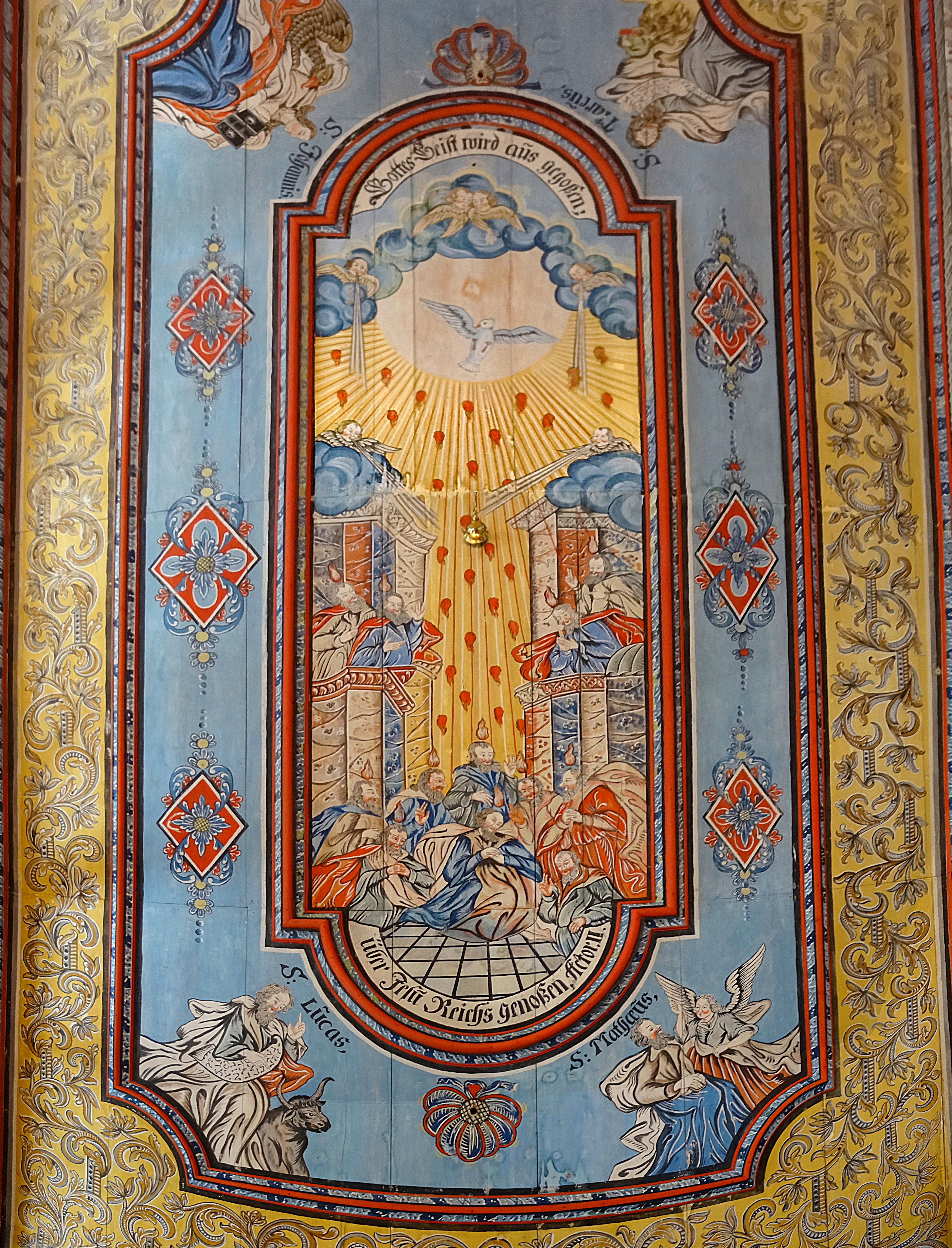 Deckengemälde Ausgießung des Heiligen Geistes in der Oberseifersdorfer Kirche